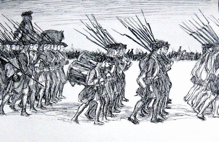 Иллюстрации к поэме Карла Снойльски о походе Карла XII.